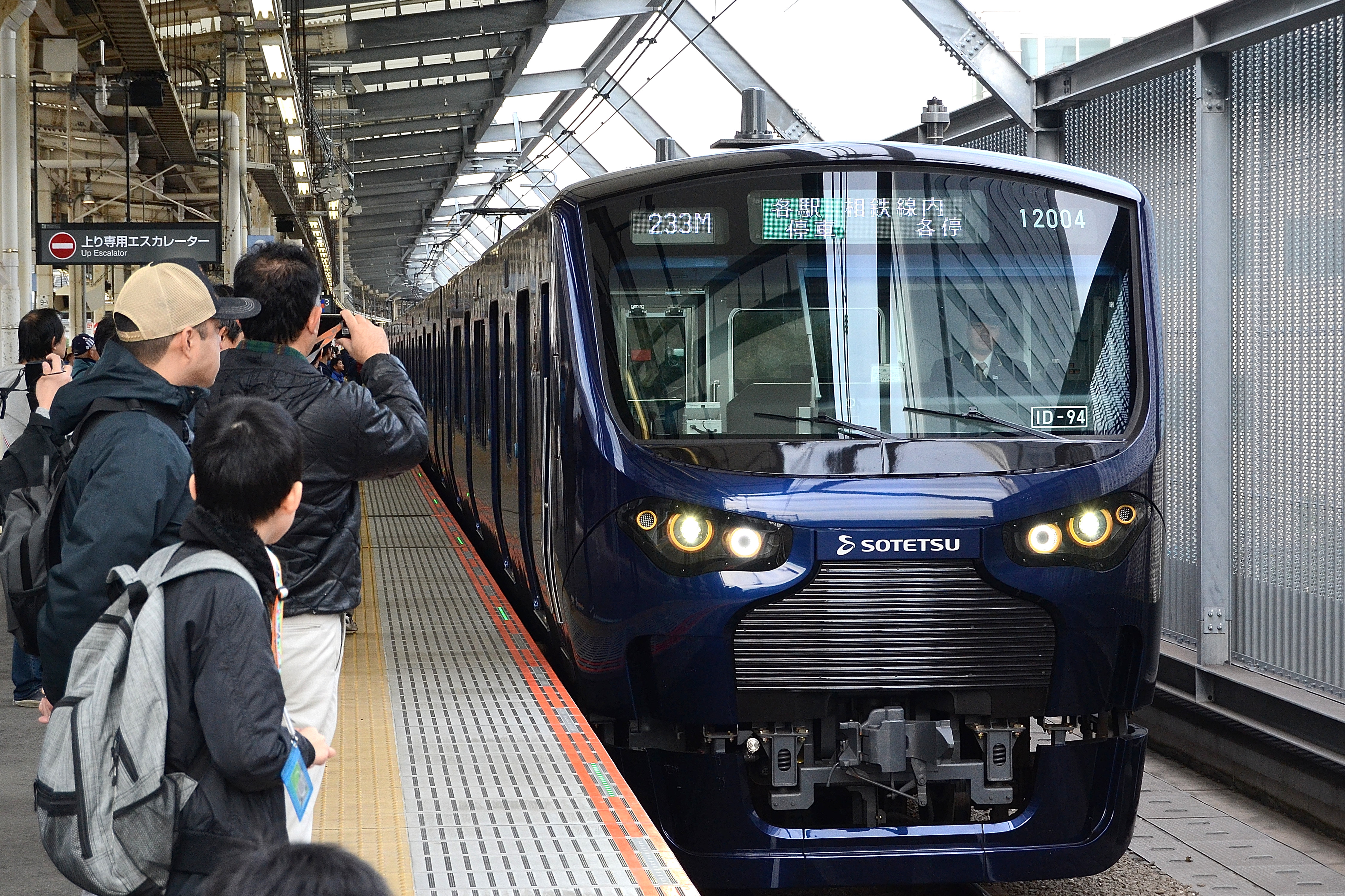 横須賀線の武蔵小杉駅に停車する相鉄12000系の下り海老名行